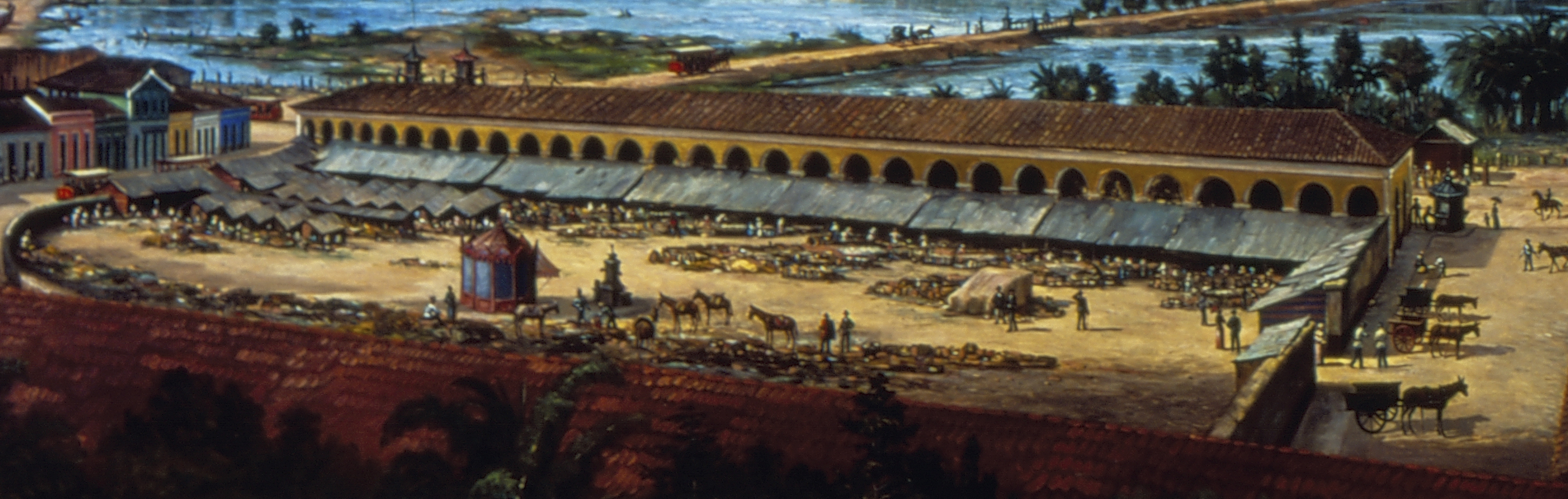 Obra que integra o acervo do Museu Paulista da USP. Coleção Benedito Calixto de Jesus - CBCJ